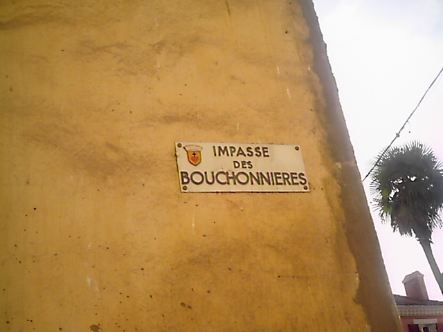 Image de la plaque de l'impasse des bouchonnières à Puget-sur-Argens (83)